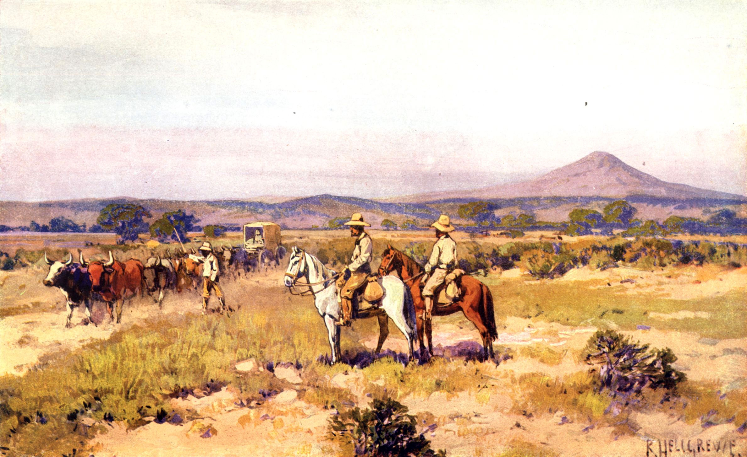 Landschafts- und Kulturbild, im Vordergrunde Steppe und Ansiedler.